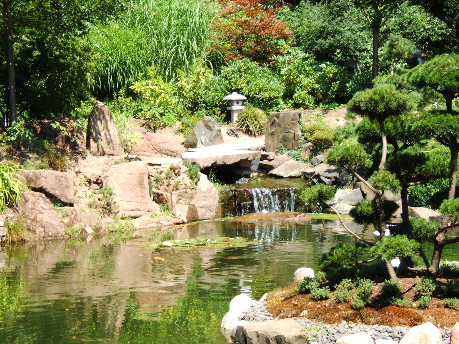 Teich im Japanischen Garten Kaiserslautern